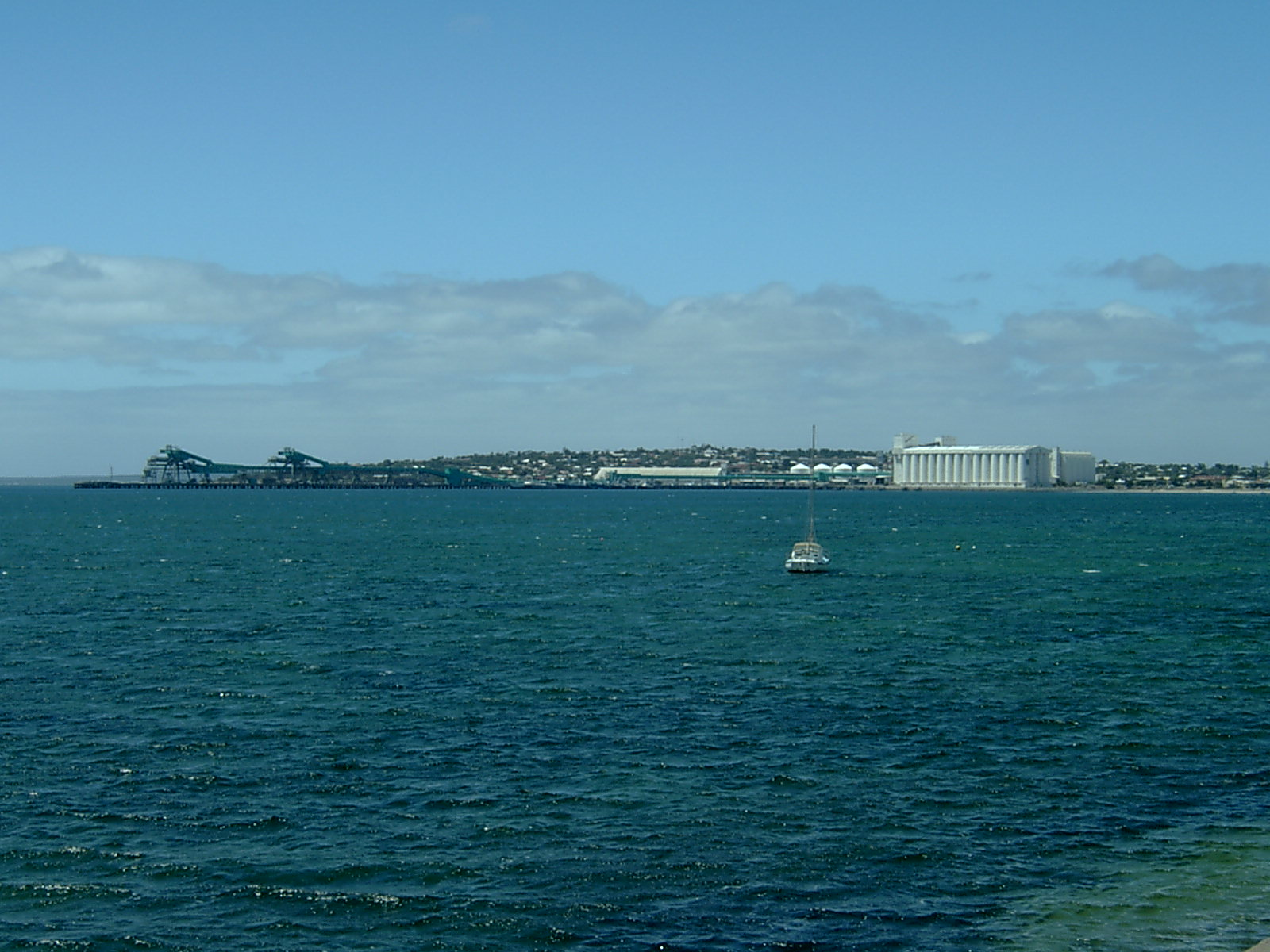 Boston Bay et Port Lincoln à l'extrémité sud ouest du Golfe Spencer January 2007.